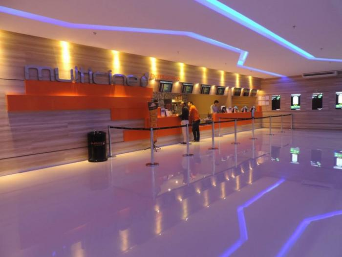 Foyer e bilheteria do Multicine Cidade Jardim